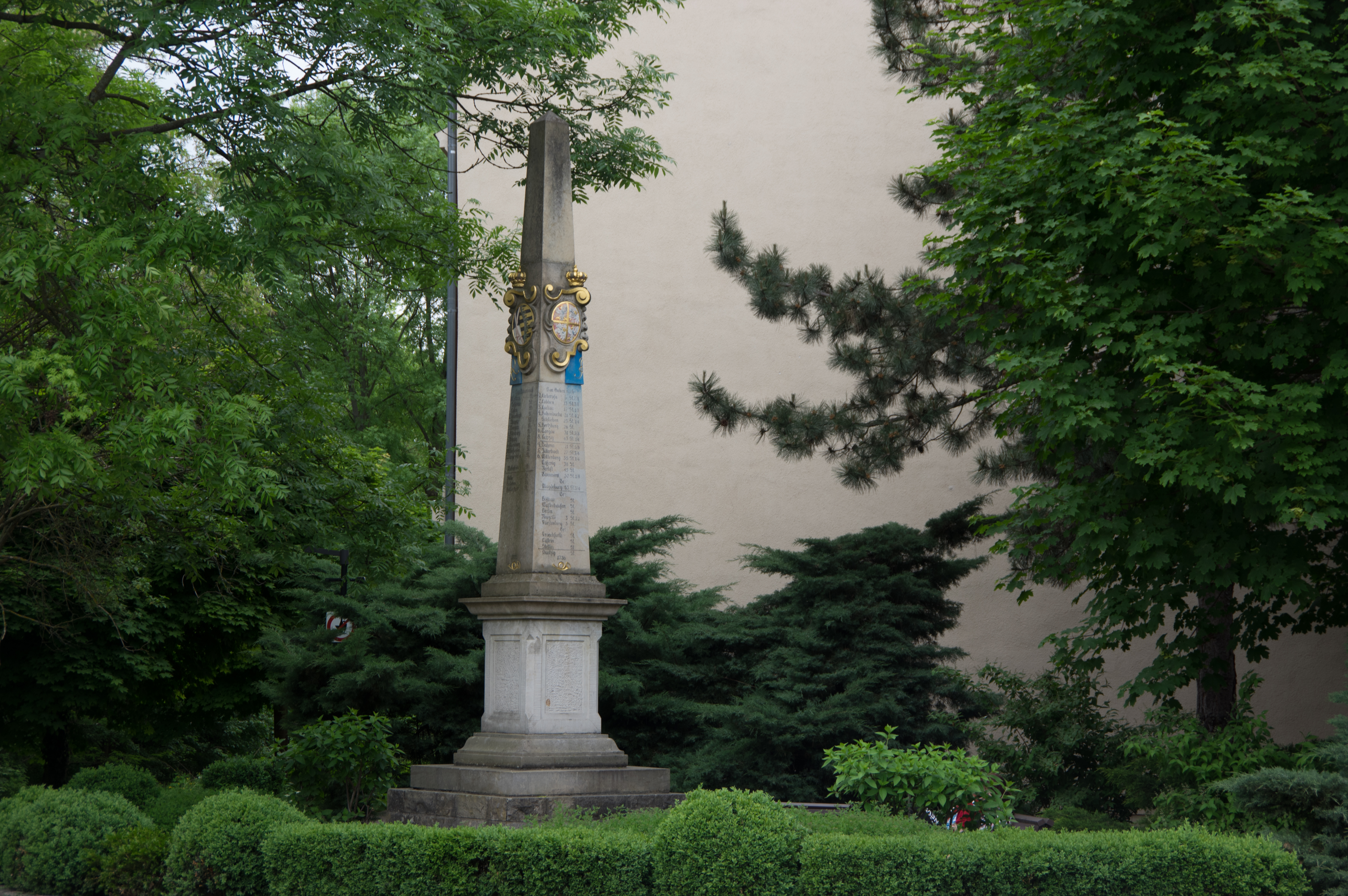 Guben in Brandenburg. Das Gebäude (Adresse im Namen) steht unter Denkmalschutz.